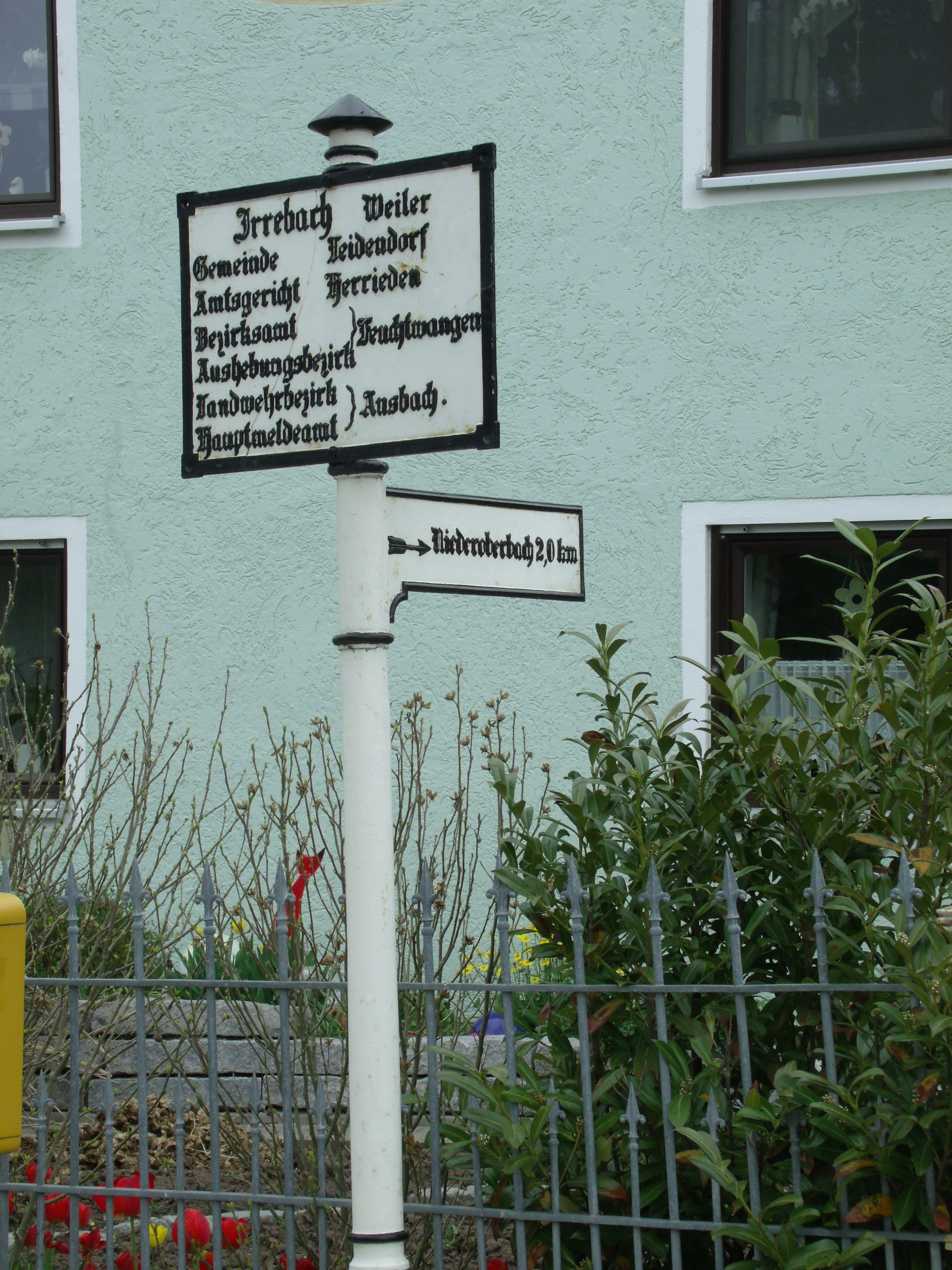 Historisches Ortsschild in Irrebach, einem Ortsteil von Weidenbach in Mittelfranken (Landkreis Ansbach)